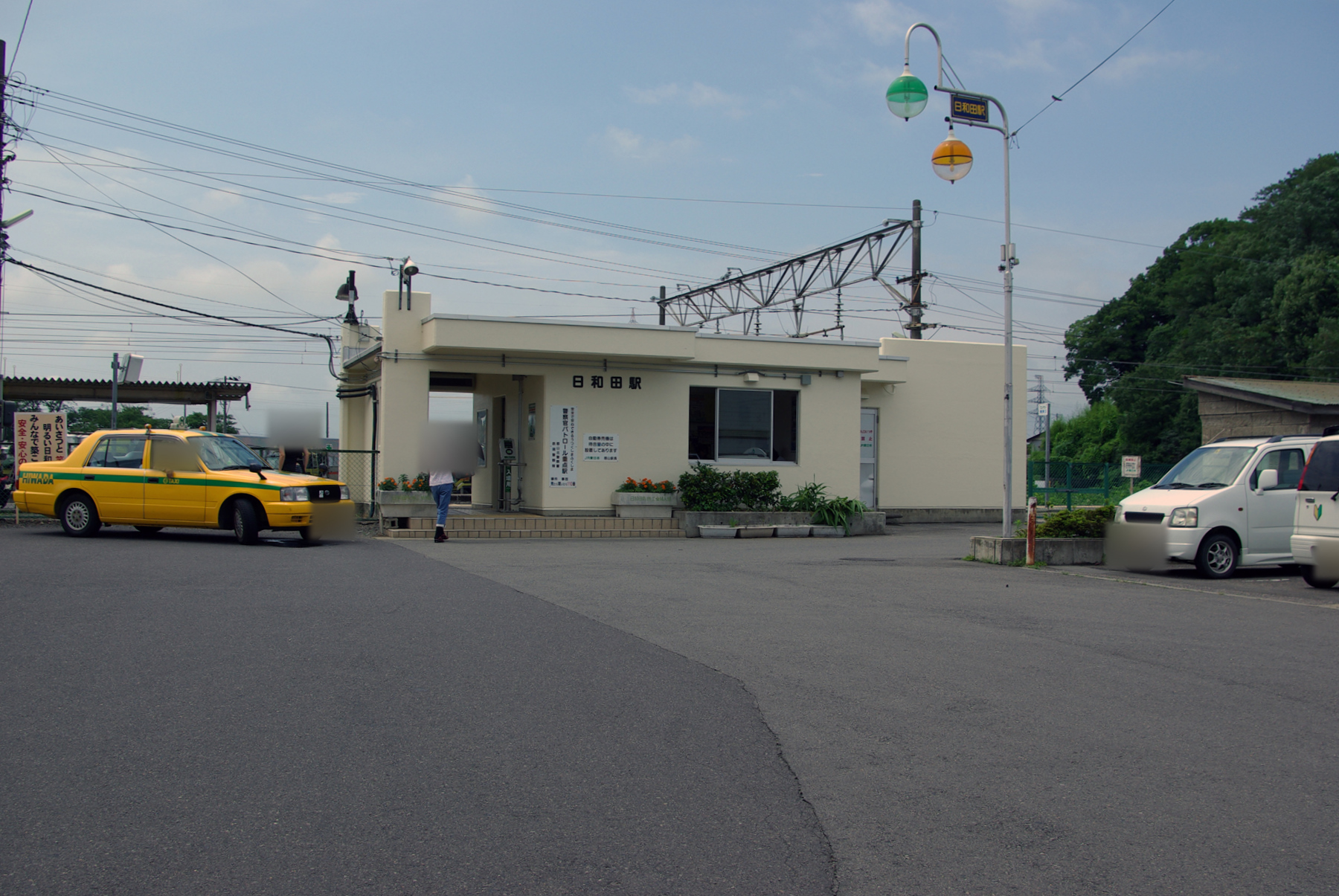 JR東北本線日和田駅